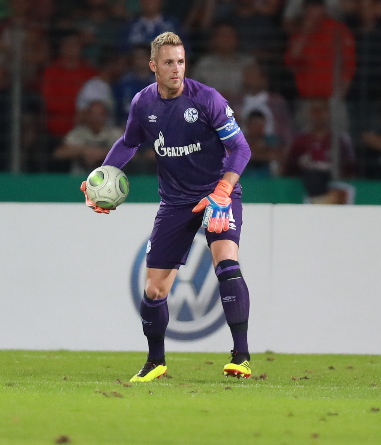 DFB-Pokal 2018/19, 1. Hauptrunde: 1. FC Schweinfurt 05 gegen FC Schalke 04 0:2 (0:1)